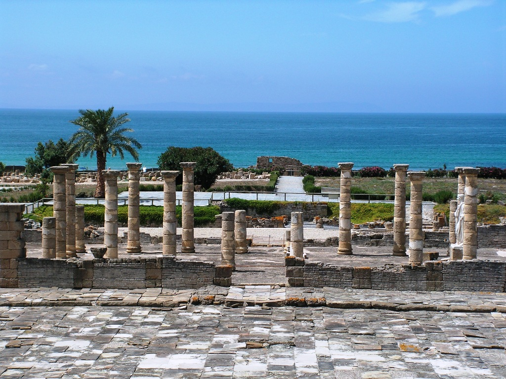 Basílica de Baelo, en Baelo Claudia, Ensenada de Bolonia, Tarifa, Cádiz